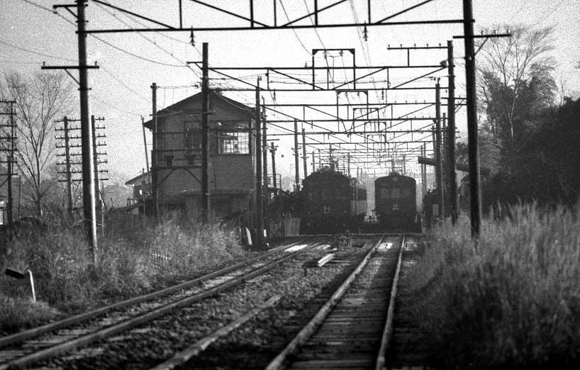 “昭和47年10月頃の片倉駅”